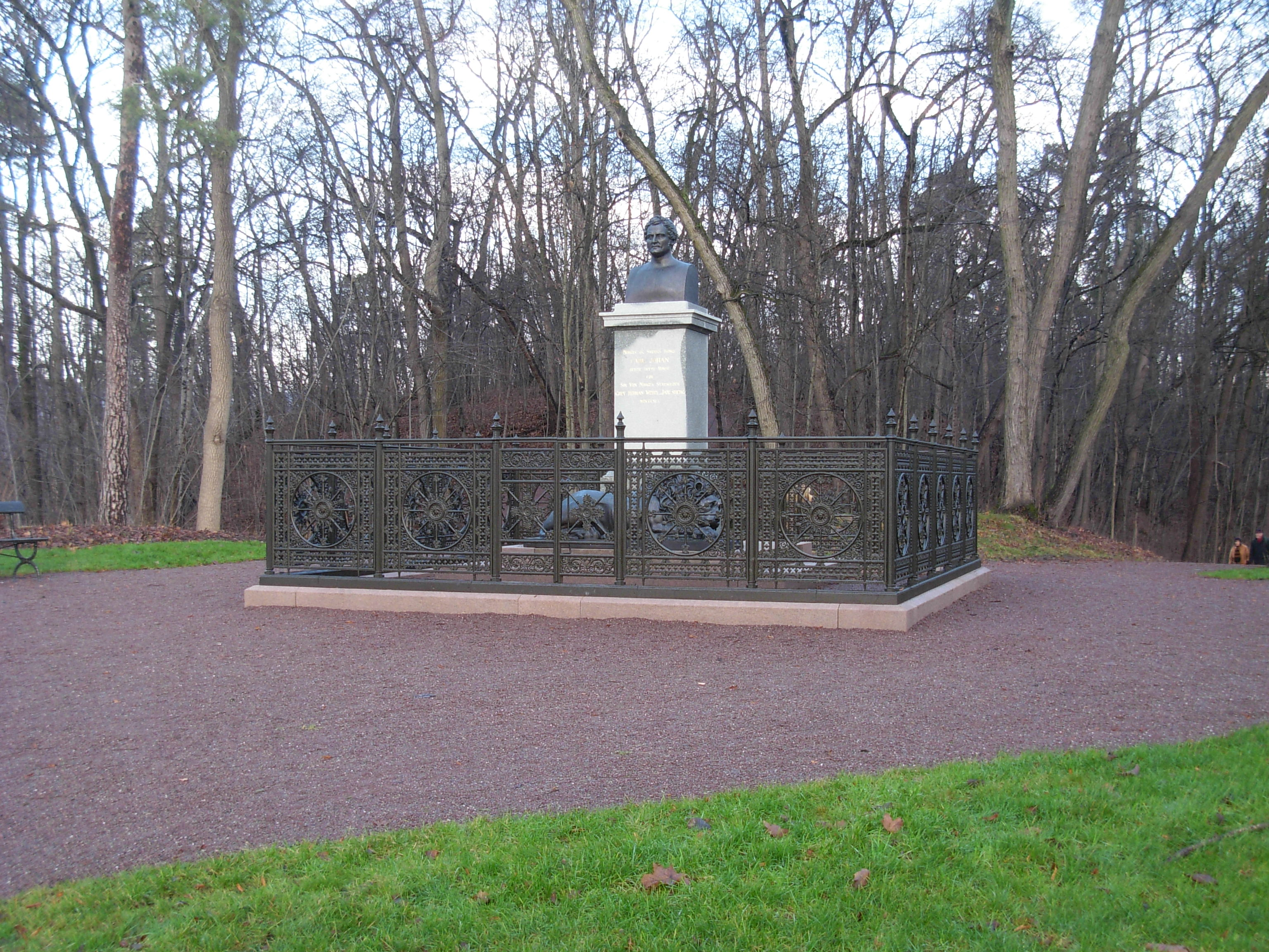 Drooningberget, Bygdøy, Oslo, monument over Herman Wedel Jarlsberg (1845 / 2007)